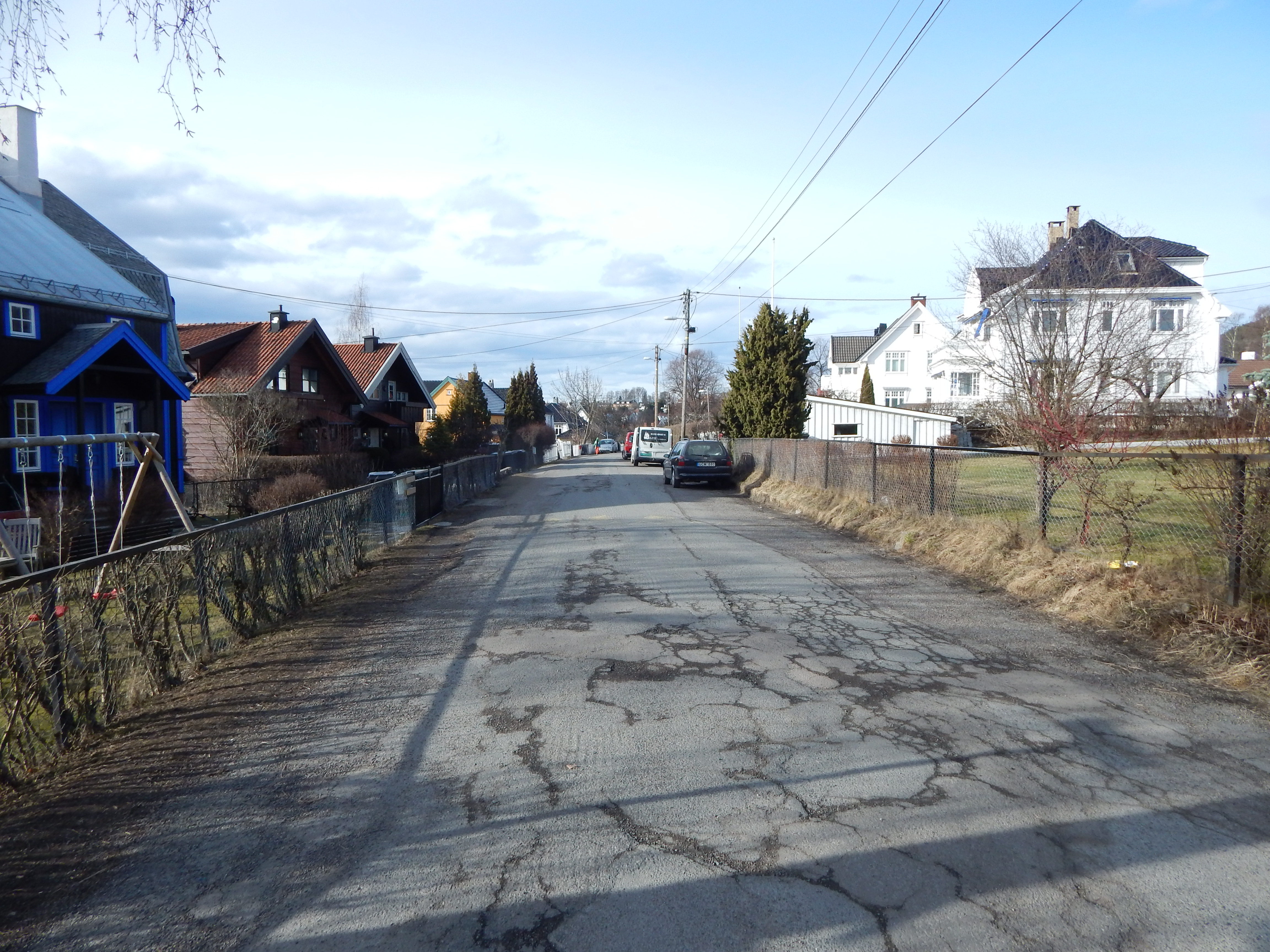 Kolderups vei